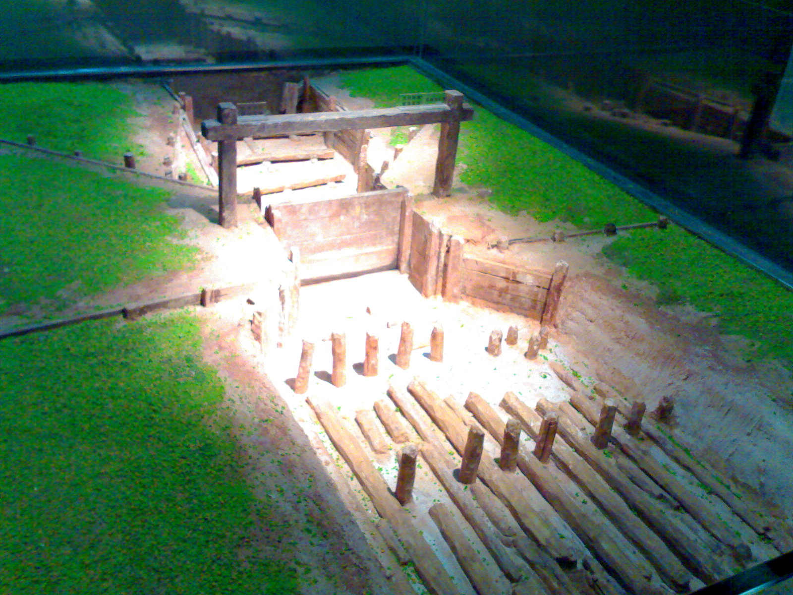 Mô hình đập nước bằng gỗ thời nhà Triệu nước Nam Việt tại thành phố Quảng Châu, tỉnh Quảng Đông, Trung Quốc. Tỉ lệ 1:15